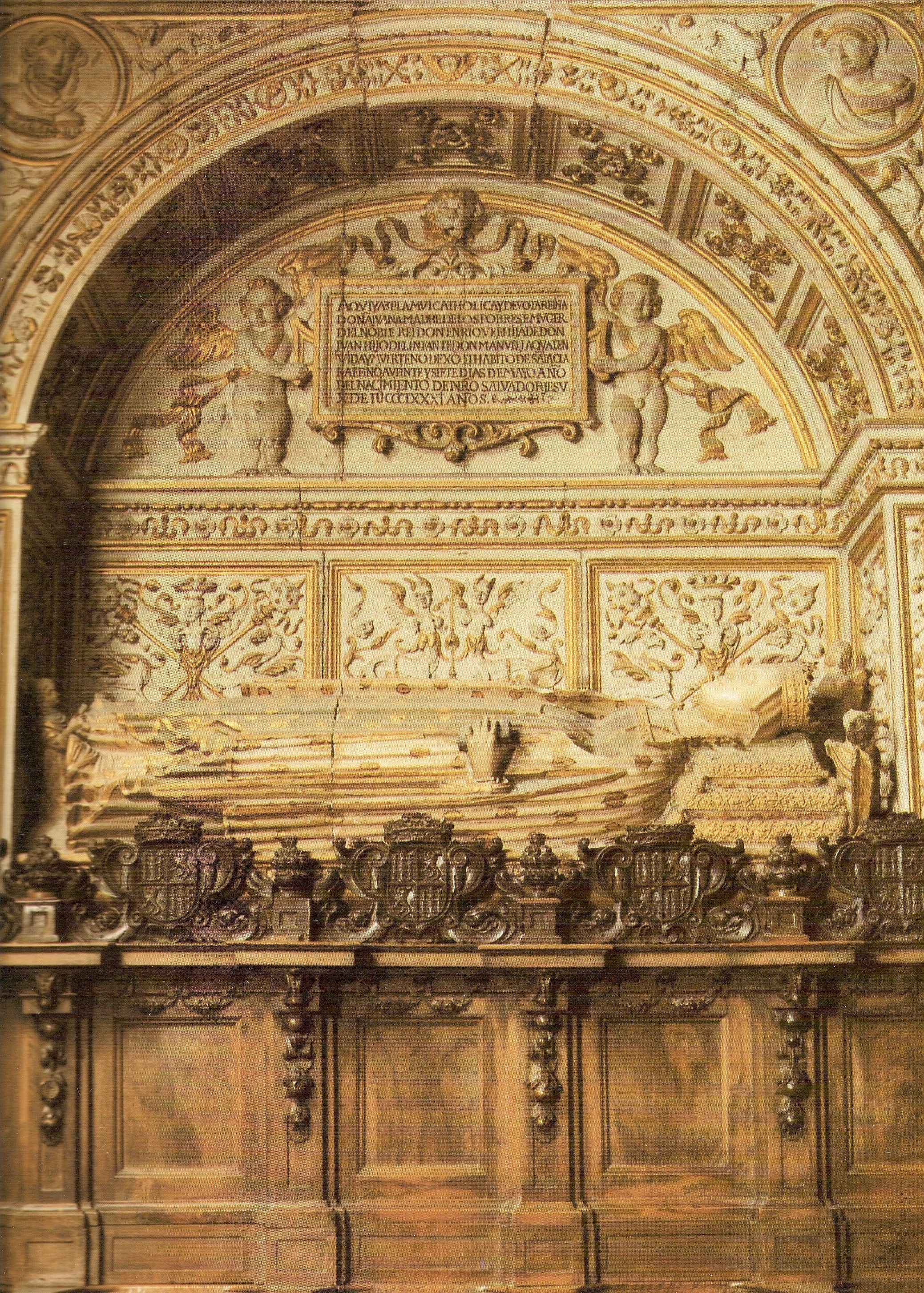 Sepulcro de la reina Juana Manuel de Villena (1339-1381), que fue hija del célebre magnate y escritor Don Juan Manuel y esposa del rey Enrique II de Castilla. Se encuentra en la capilla de los Reyes Nuevos de la catedral de Toledo.